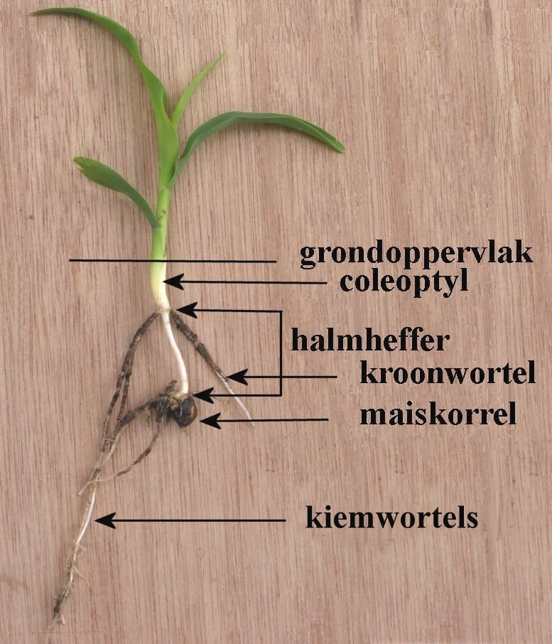 zelfgemaakte foto met bijschriften van kiemplant suikermais half juni